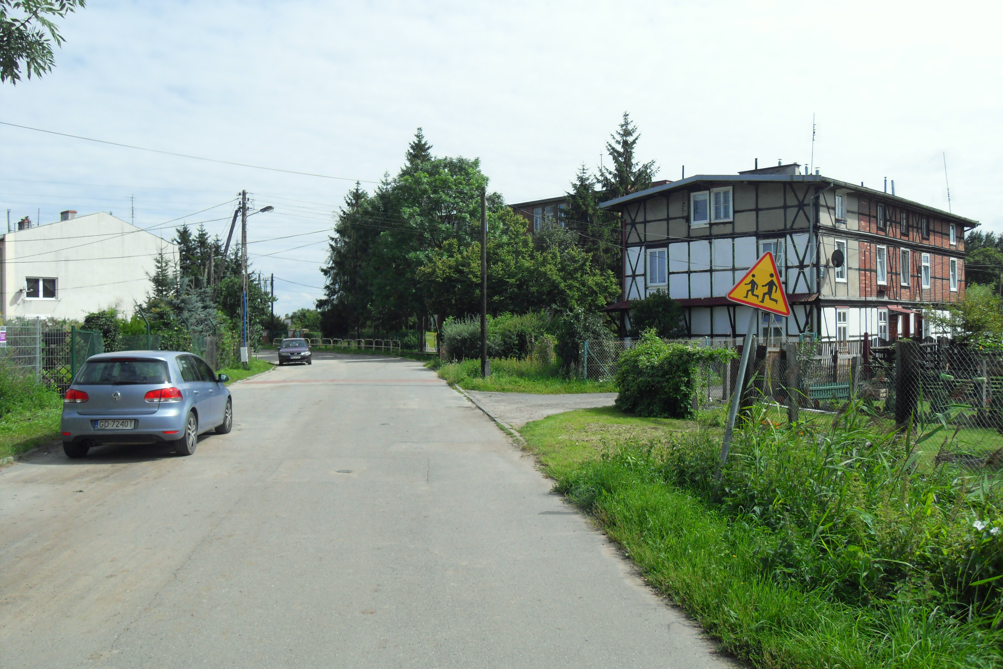 Gdańsk Błonia, ul. Miałki Szlak.